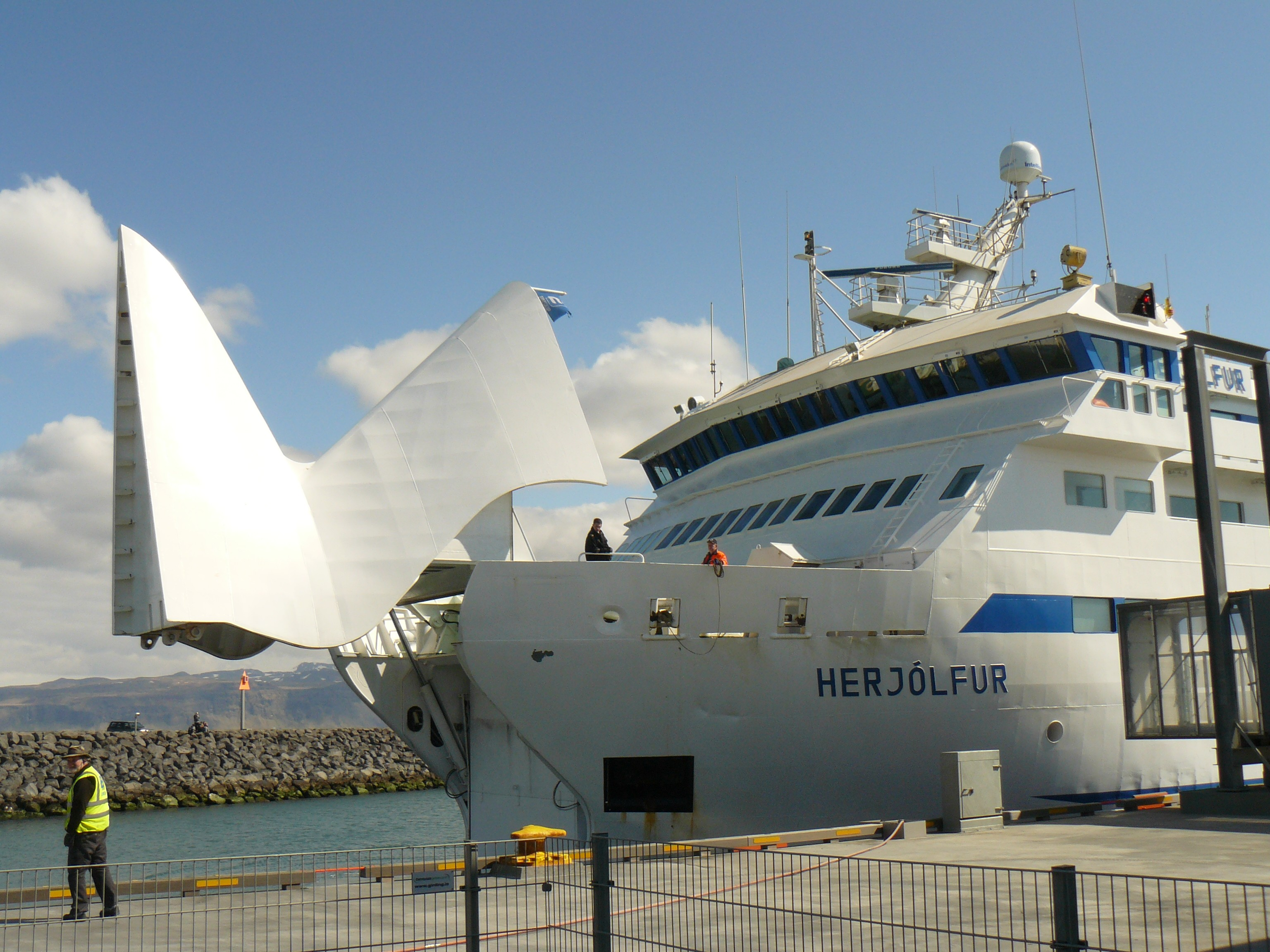 Le ferry-boat Herjólfur à son arrivée au port de Landeyjahöfn, en provenance de Heimaey (Vestmanneyjar), en Islande.